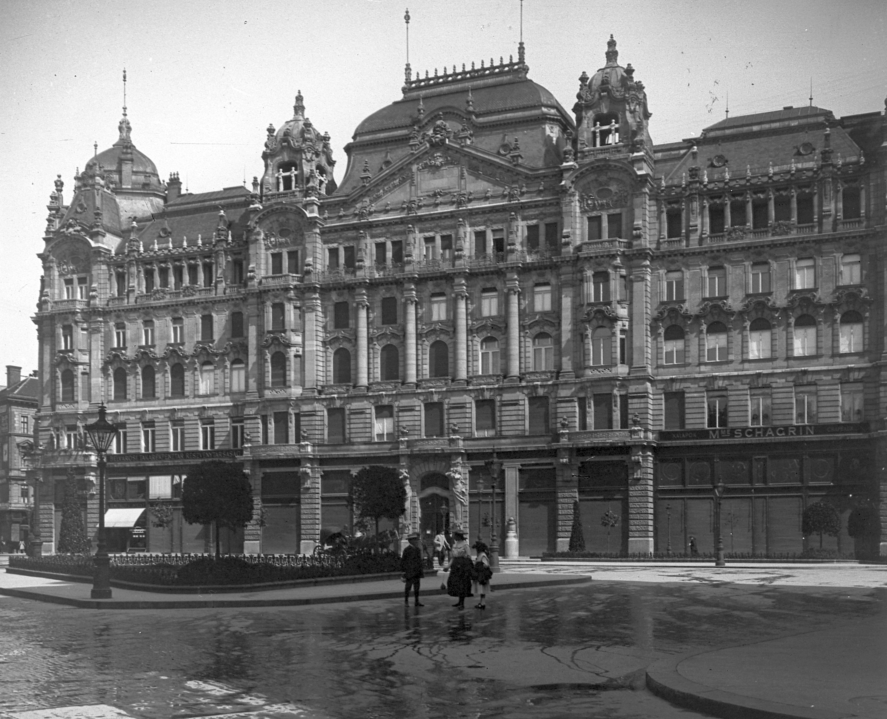 Ferenciek tere 2. (Kígyó tér 1.), Királyi Bérpalota. Location: Hungary, Budapest V. Tags: architecture, architectural heritage, Budapest Title: Ferenciek tere 2. (Kígyó tér 1.), Királyi Bérpalota.